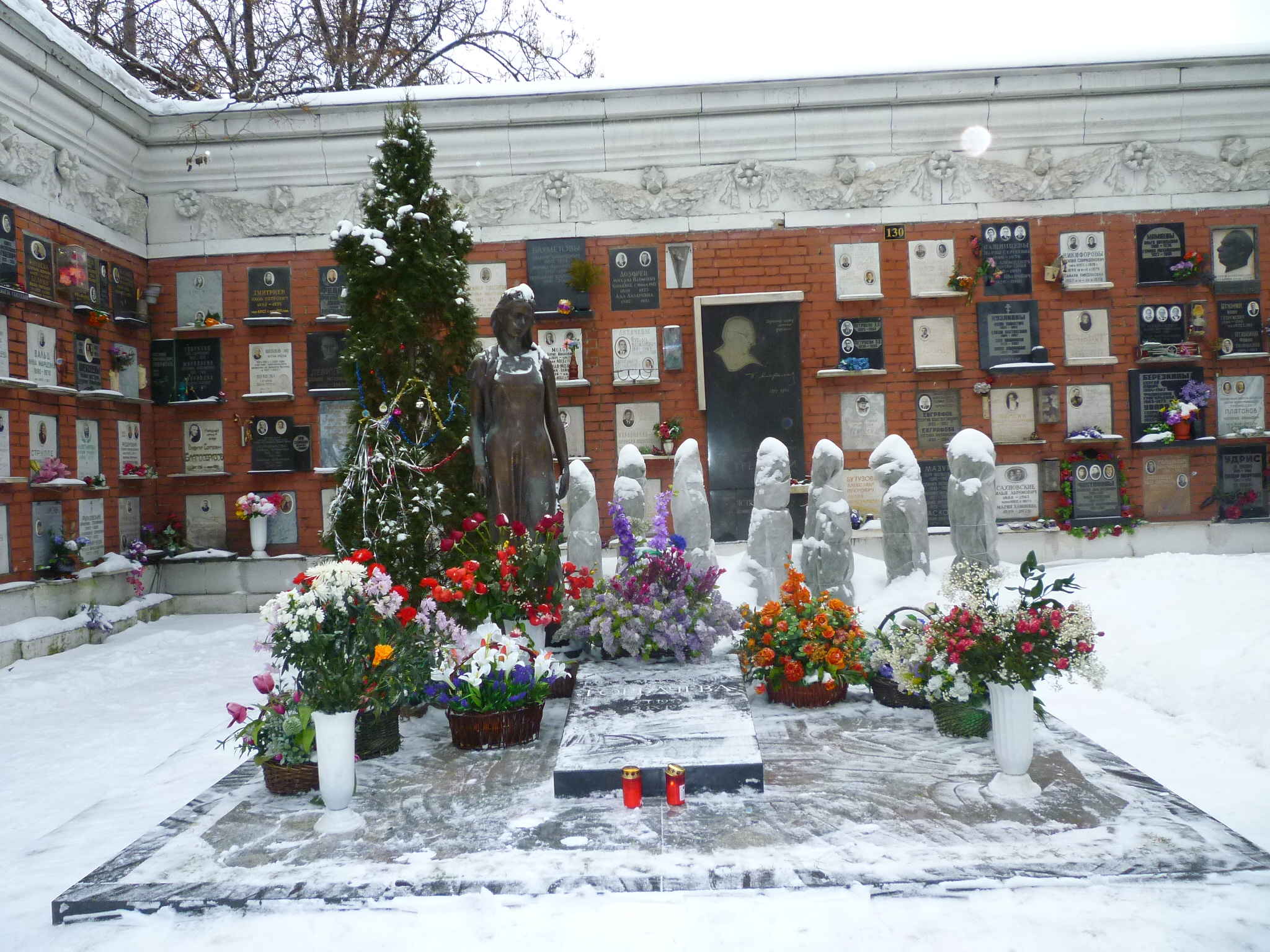 Raissa Gorbachyova è sepolta nel cimitero di Novodevičij a Mosca